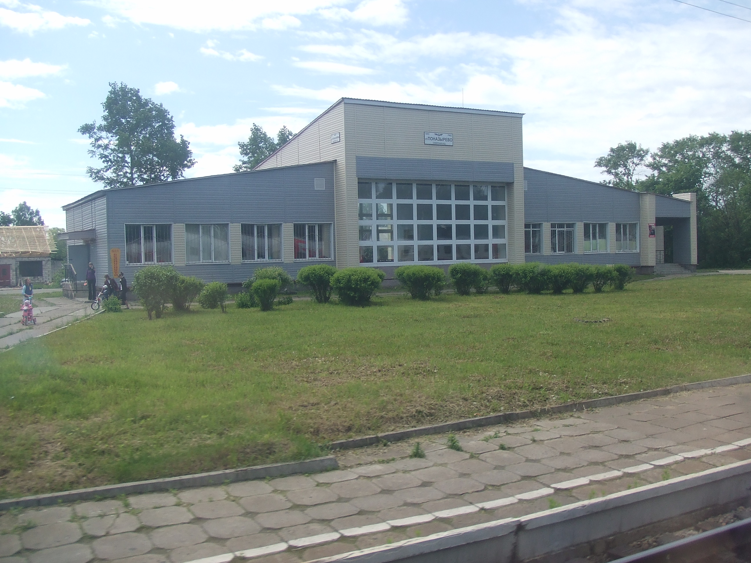 Вокзал Поназырово